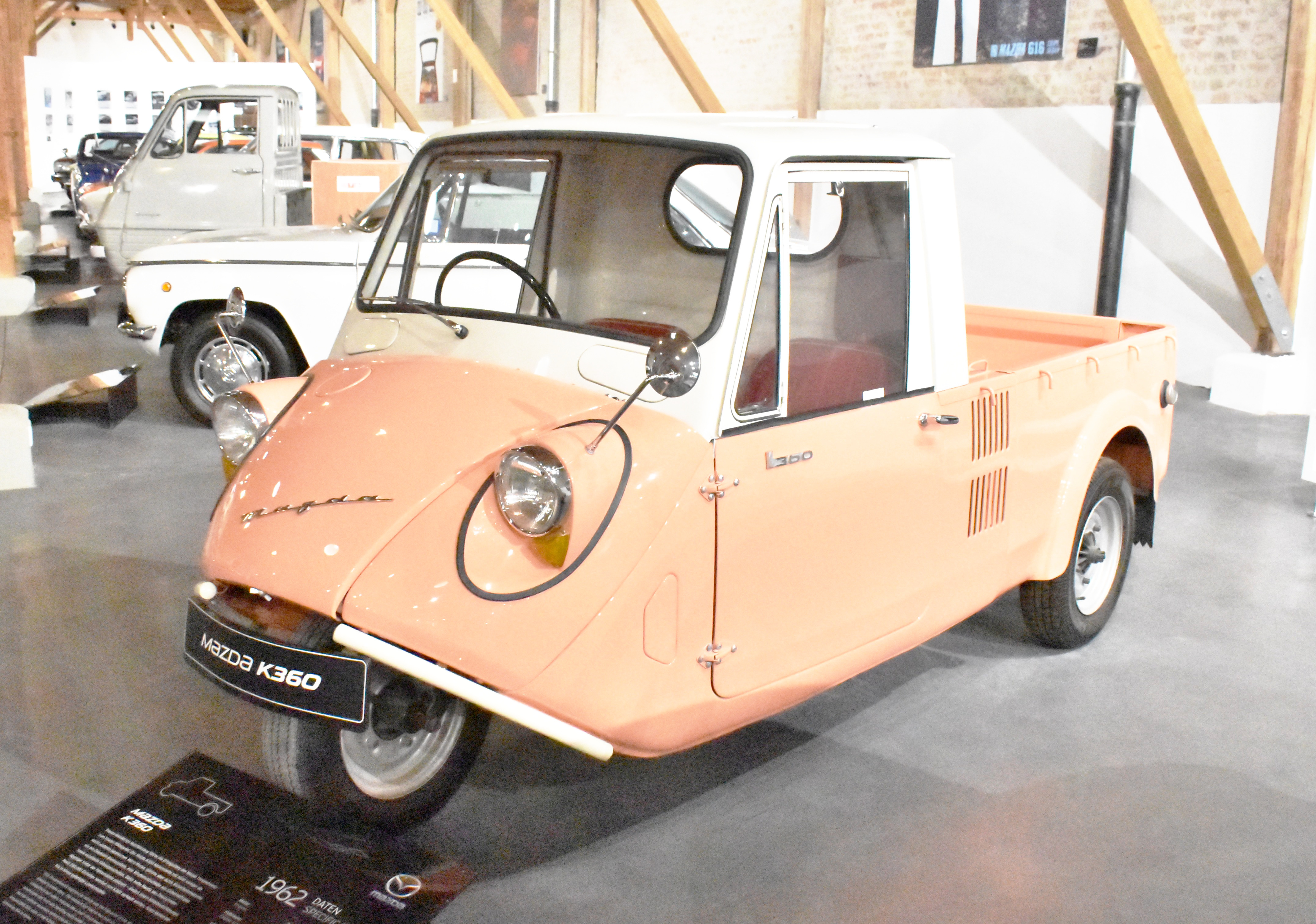 Mazda K360, Baujahr 1962, im Mazda-Museum Augsburg